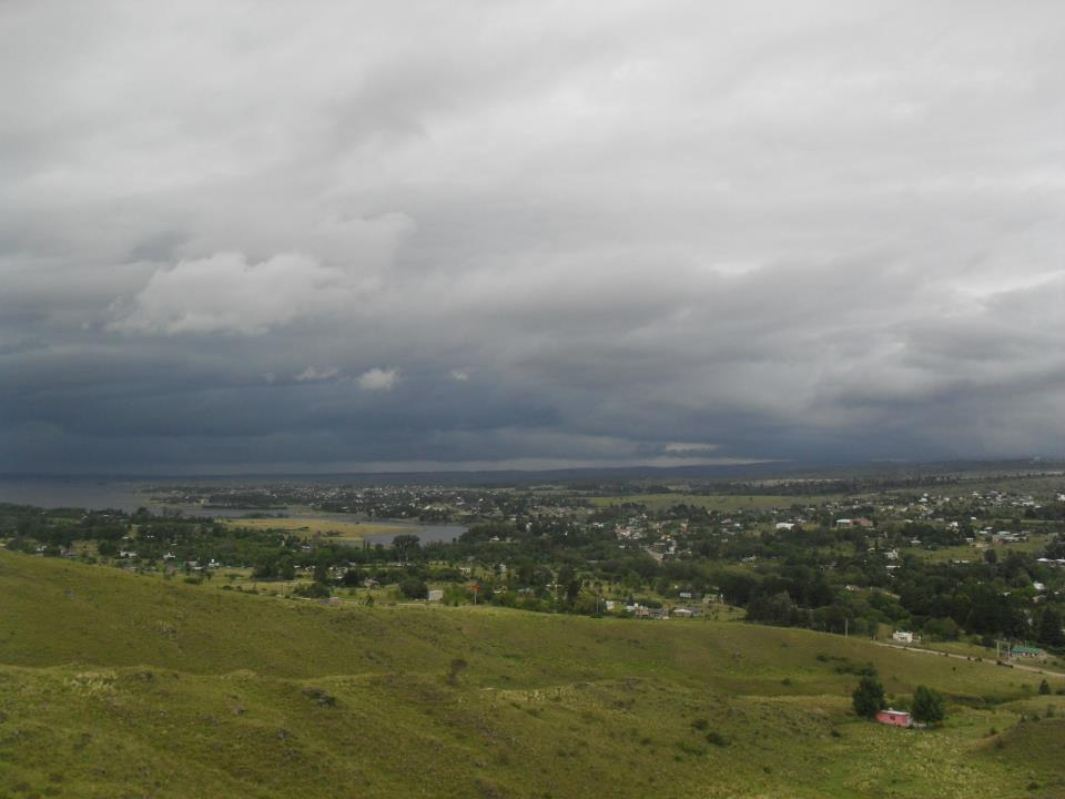 Vista de Potrero de Garay junto al Lago Los Molinos. Provincia de Córdoba, Argentina.